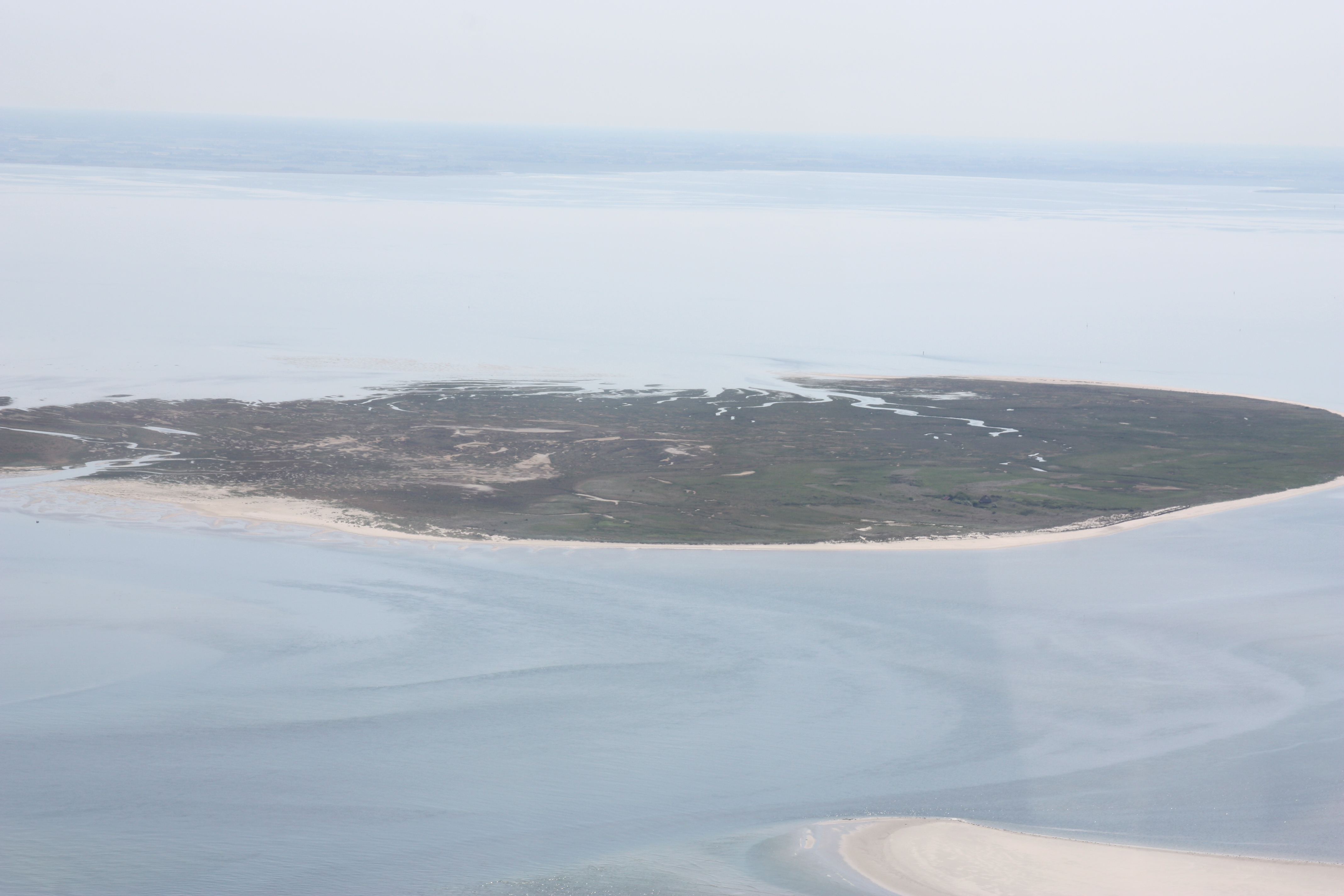 Flug über Juist - von Borkum kommend, zuerst am Nordstrand entlang; Flughöhe 500 m = 1500 ft; Juli 2010